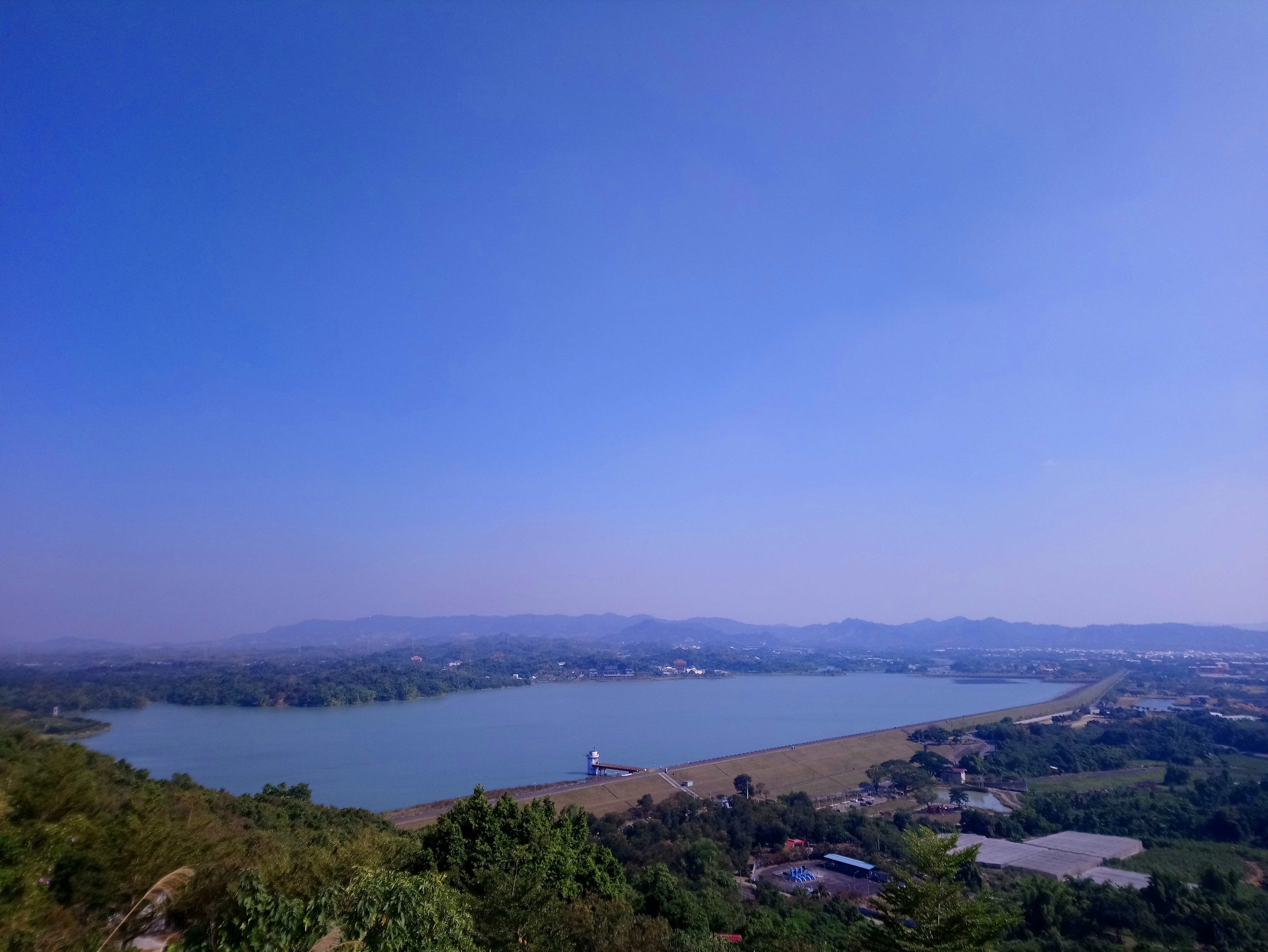 自小崗山觀景台瞭望阿公店水庫。